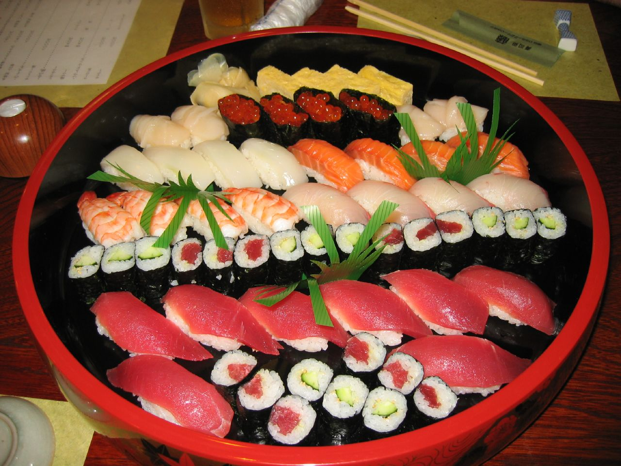 Le superbe plateau de sushi dans ce petit restaurant traditionnel de Kofu. 24 € le plateau! Ca rend dingue... Pour 24 €, en France ou en Irlande, on a 10 sushi, ou alors 15 si on connait les bonnes adresses !